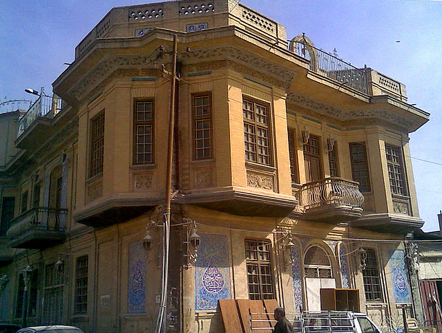 Baghdad